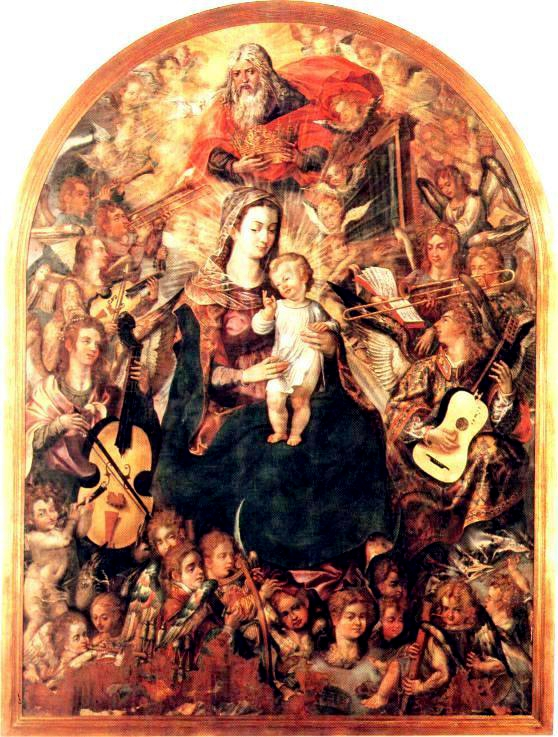 "A Coroação da Virgem", an early 17th century work of the Portuguese painter Vasco Pereira Lusitano (1535-1609).